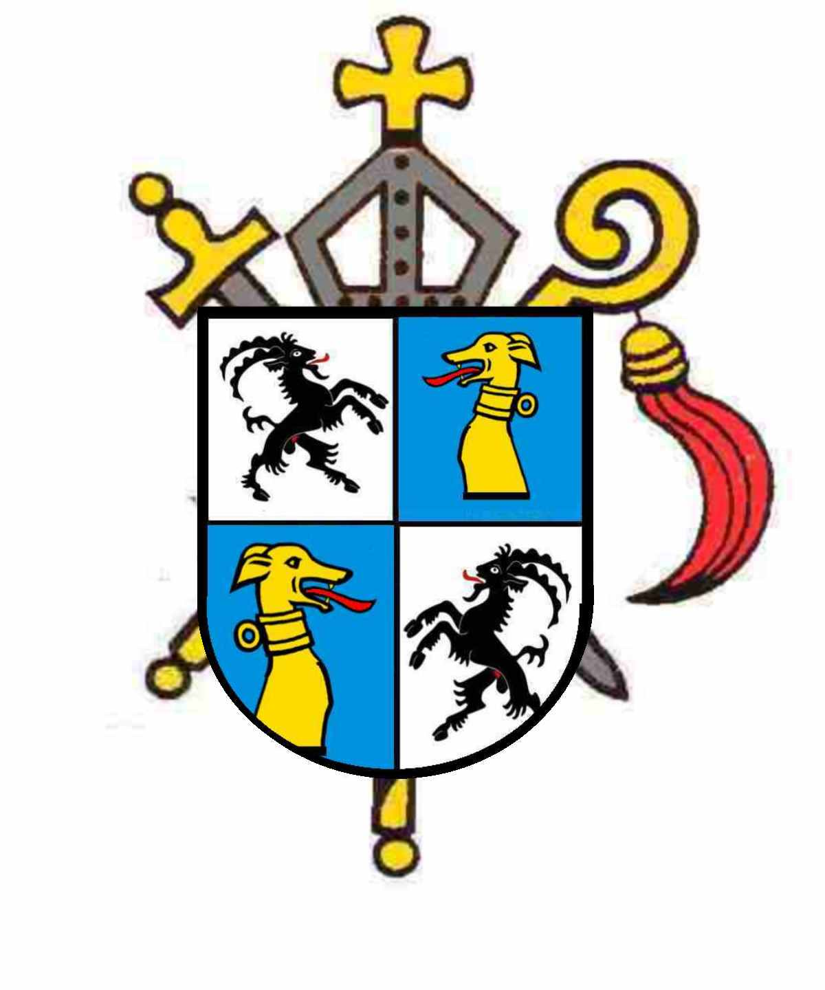 Wappen Joseph Benedikt von Rost, Fürstbischof von Chur 1729-1754